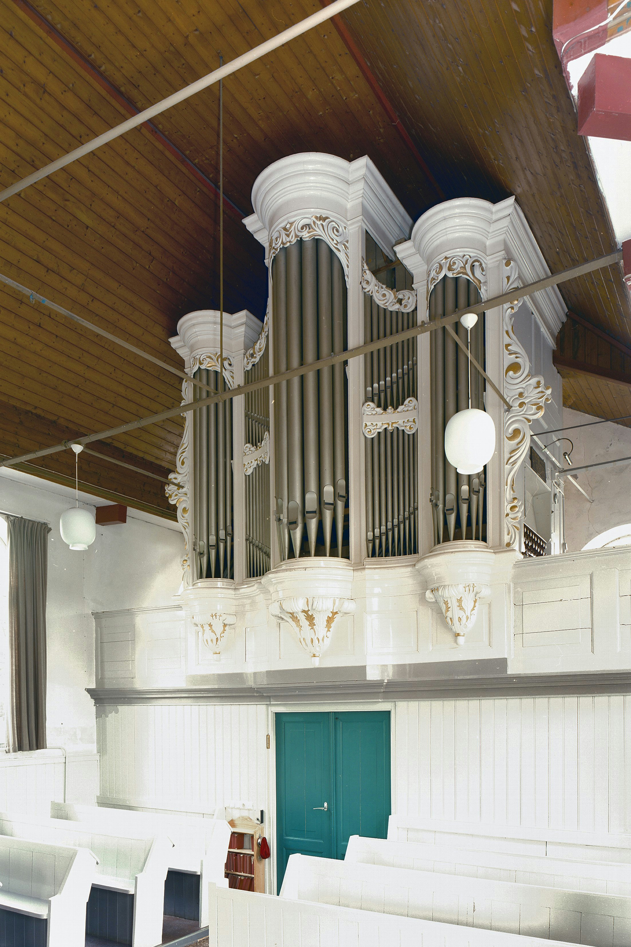 Gereformeerde kerk: Interieur, overzicht van het orgel (opmerking: Gefotografeerd voor Het Historische Orgel in Nederland)